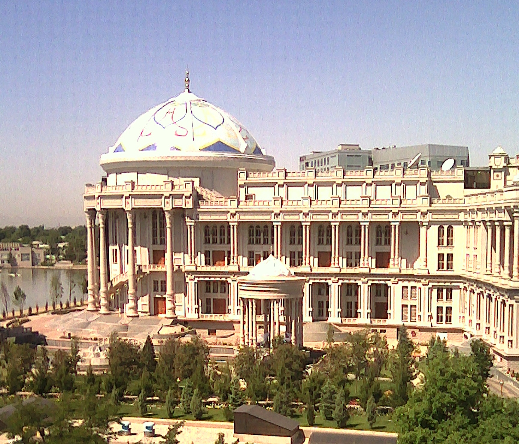 Здание чайханы "Наврузгох" в Душанбе Тоҷикӣ: Бинои чойхонаи "Наврӯзгоҳ" дар Душанбе